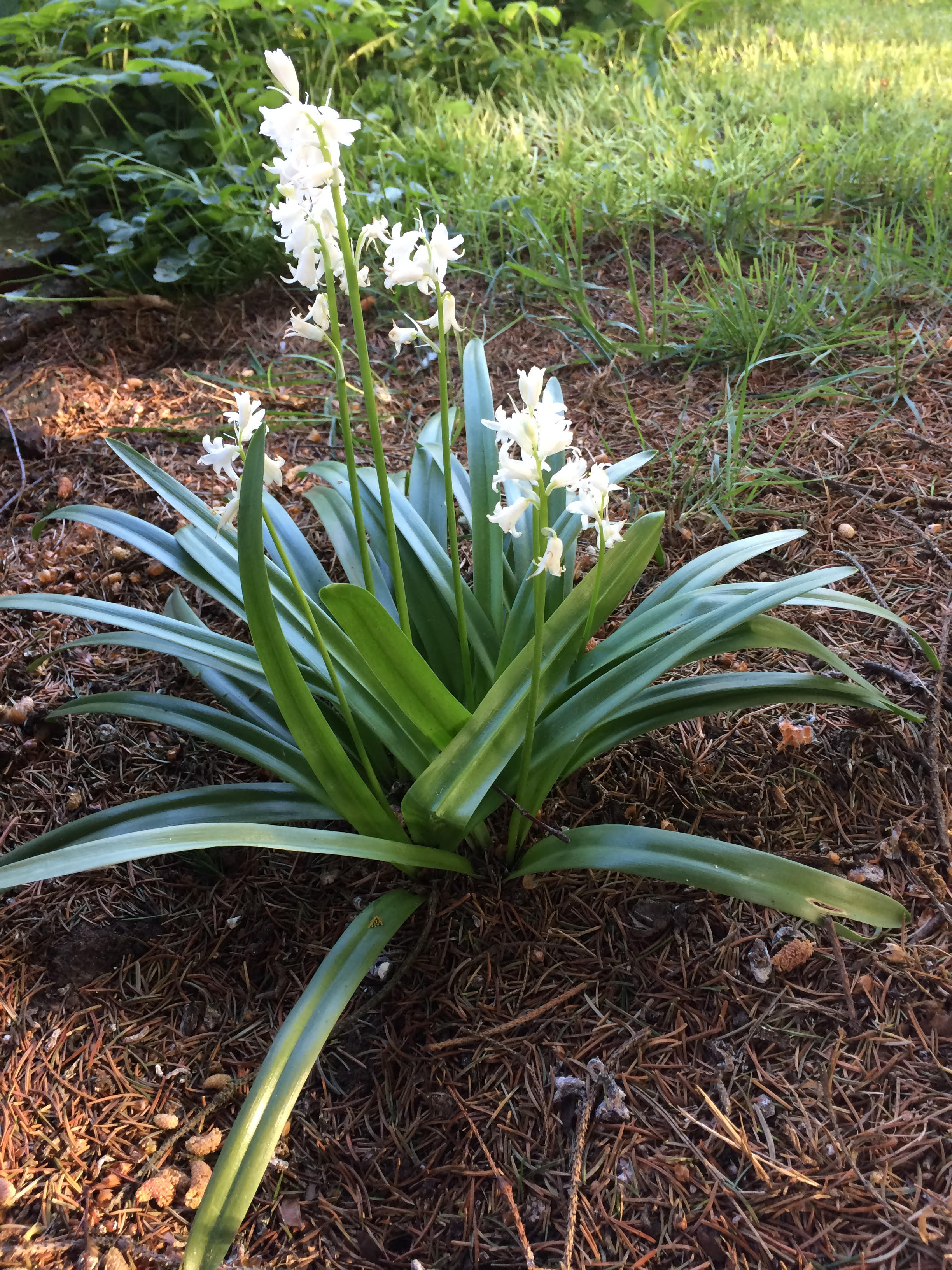 Foto prenita en la ĝardeno de Petro De Smet okaze de vizito